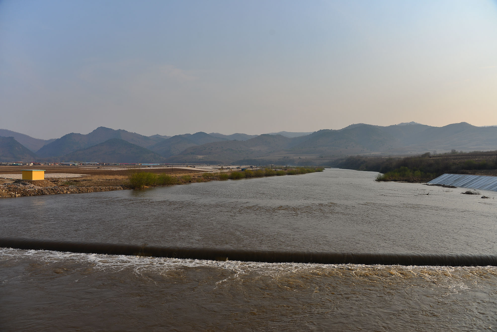 巡道工出品 photo by Xundaogong 太平沟附近的大绥芬河